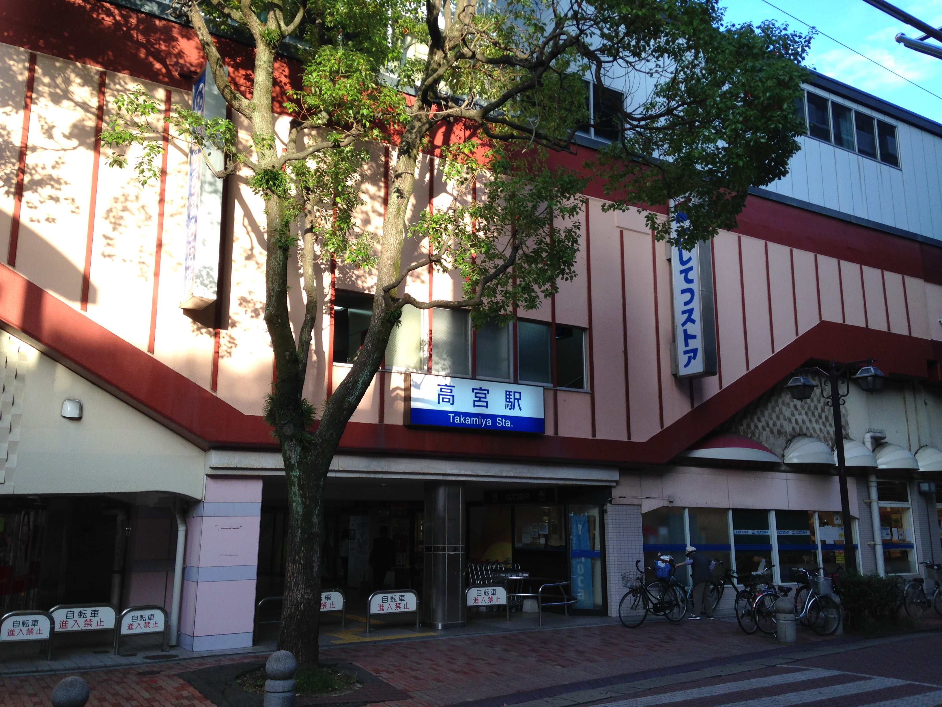 高宮駅西口